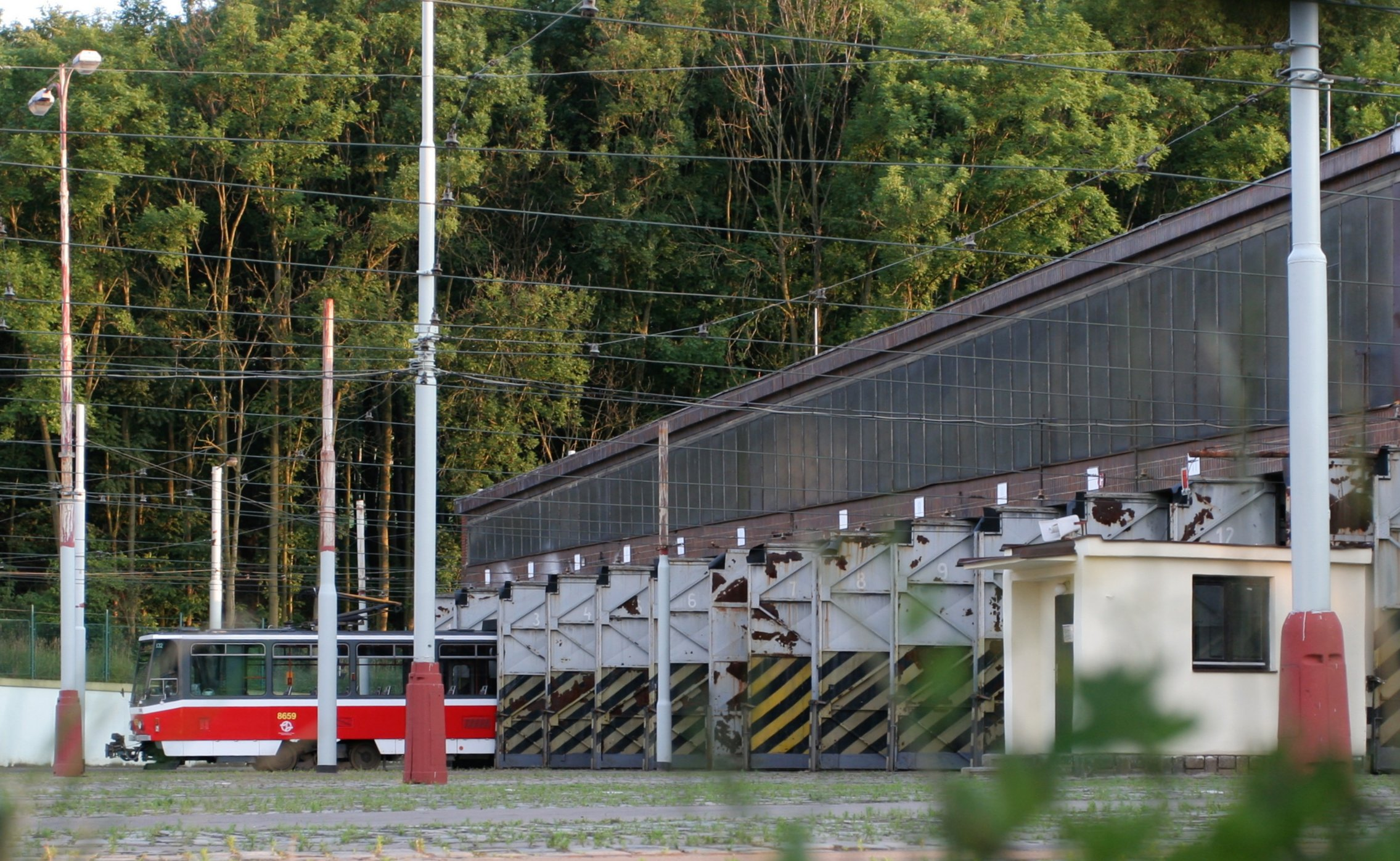 Vozovna Motol, Praha